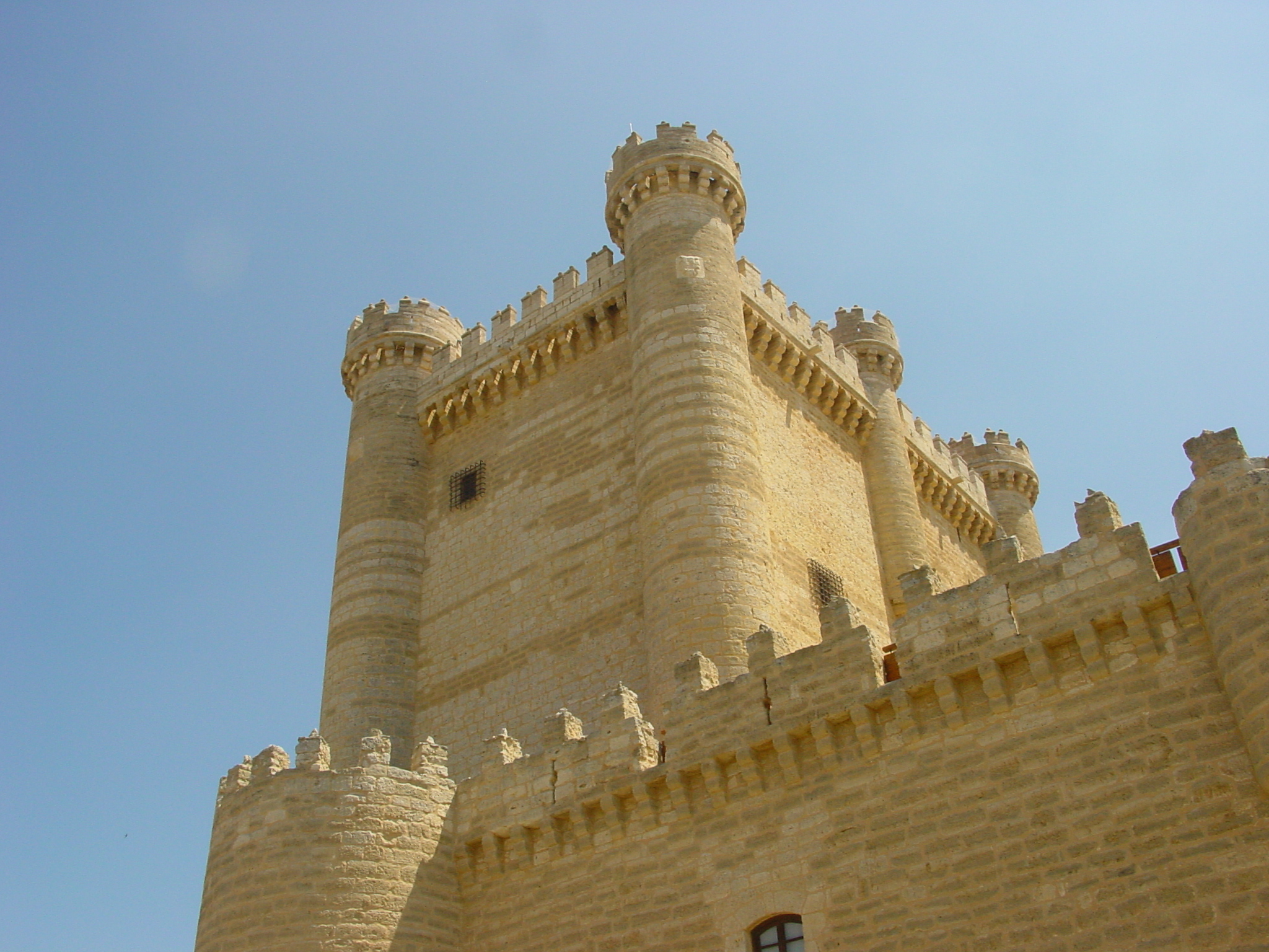 Castillo de Fuensaldaña en Valladolid.